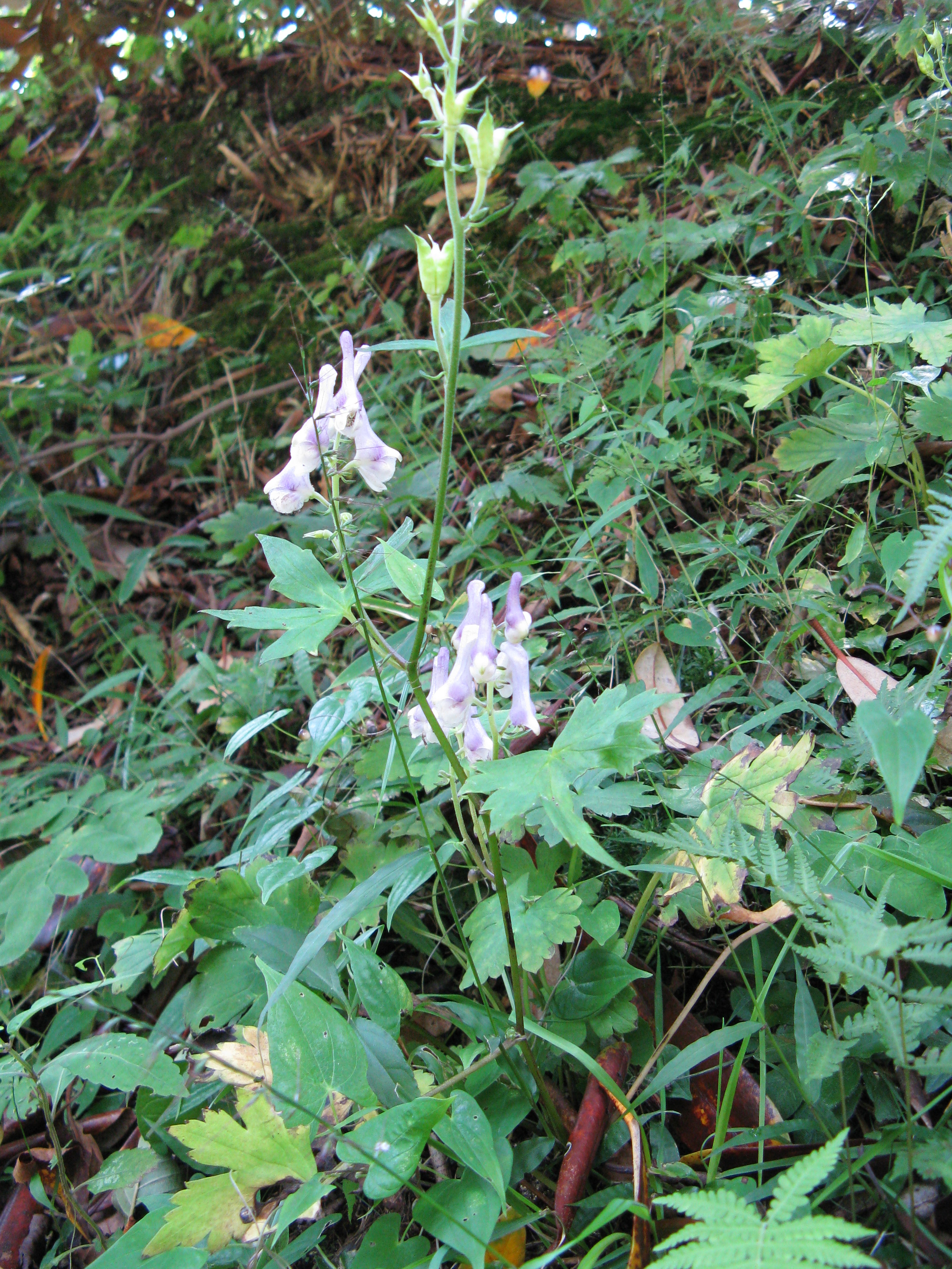 Scientific name Aconitum loczyanum